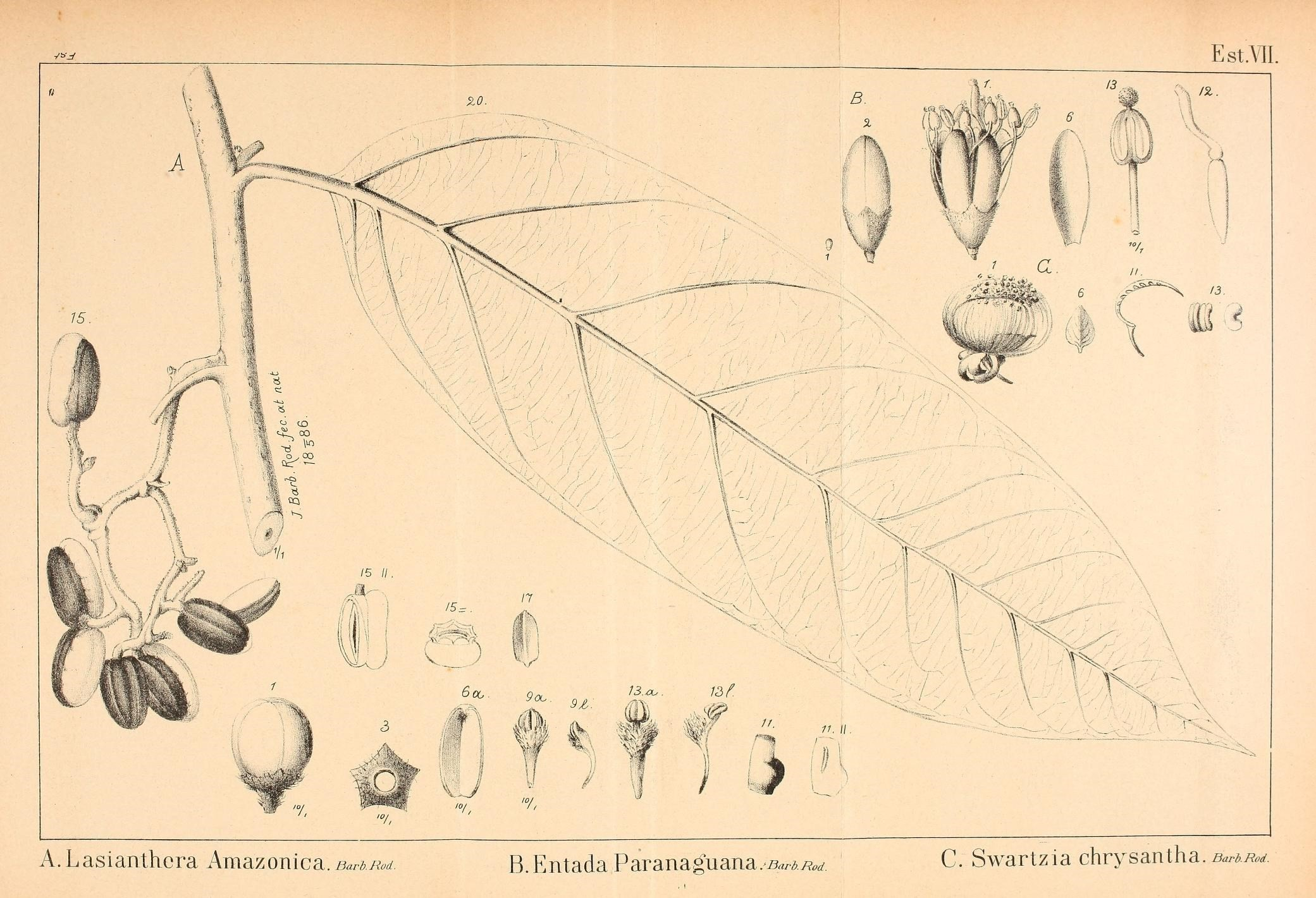 Est.VII. A.Lasianthcra Amazonica.^/^ B.Entada Paraná guana.^/w C. Swartzia chrysantha. émoí.